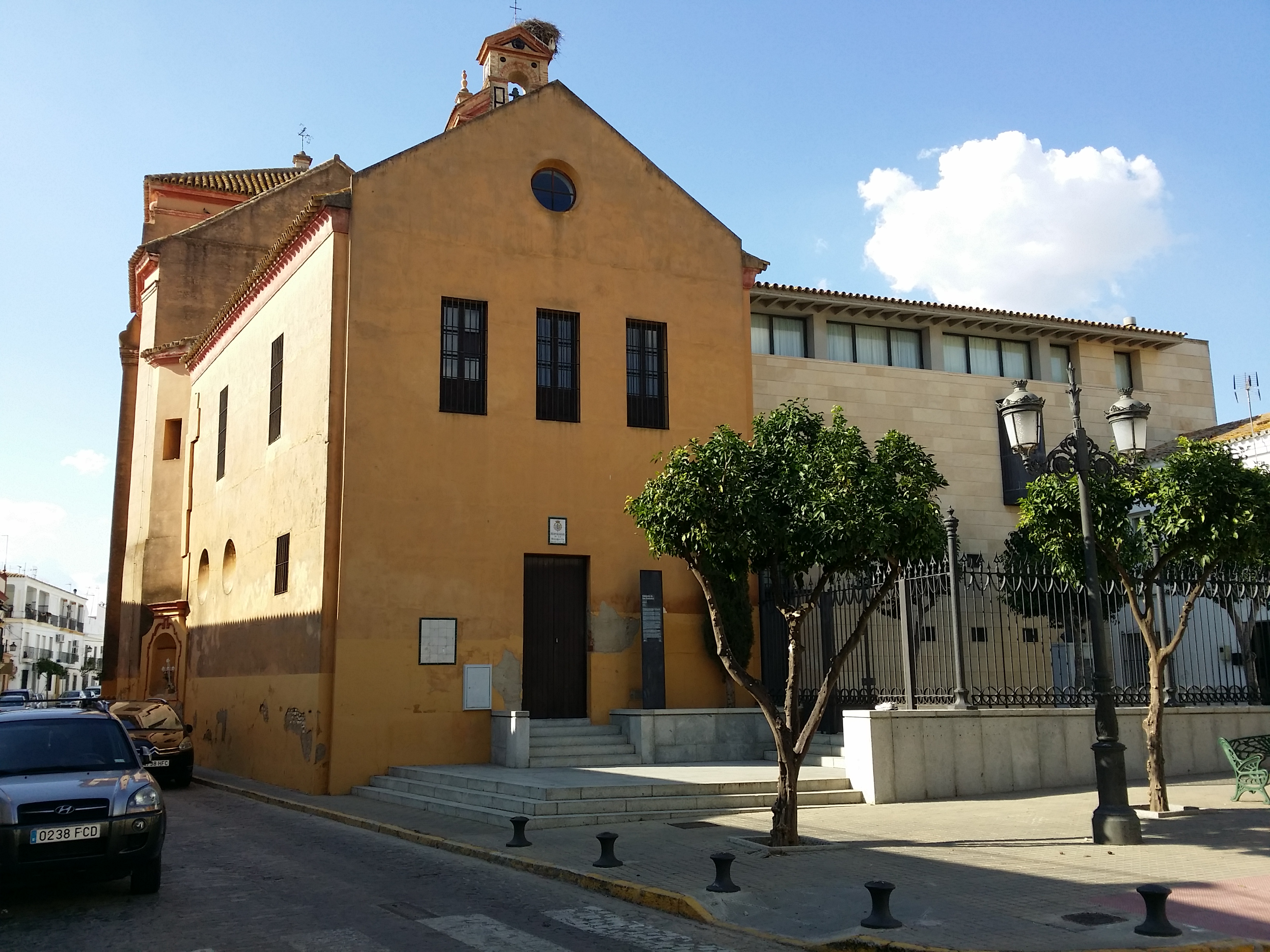 Mosteiro do San Francisco. Exterior.